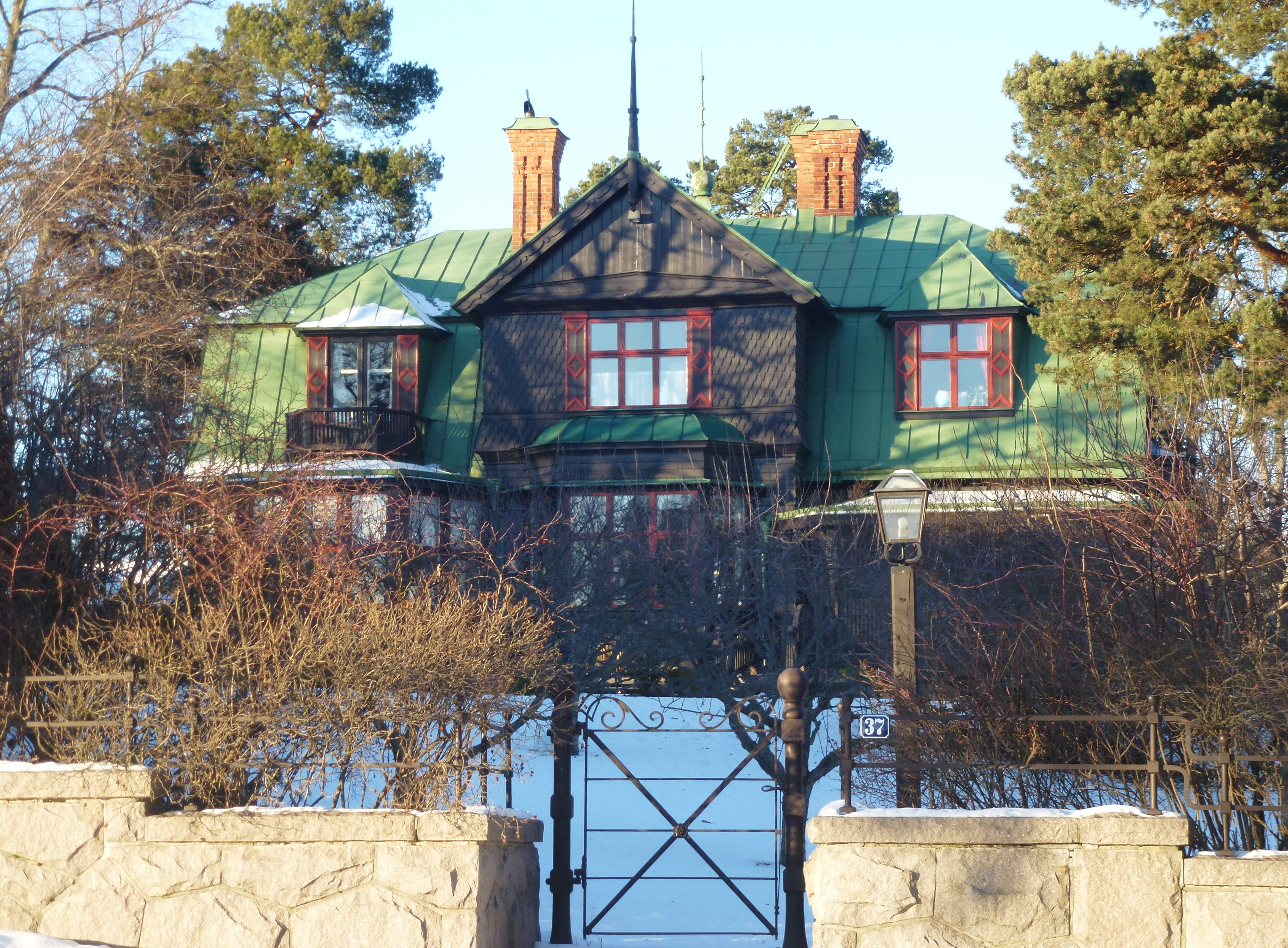 Villa Delling, Strandvägen 37, Djursholm, arkitekt Kasper Salin